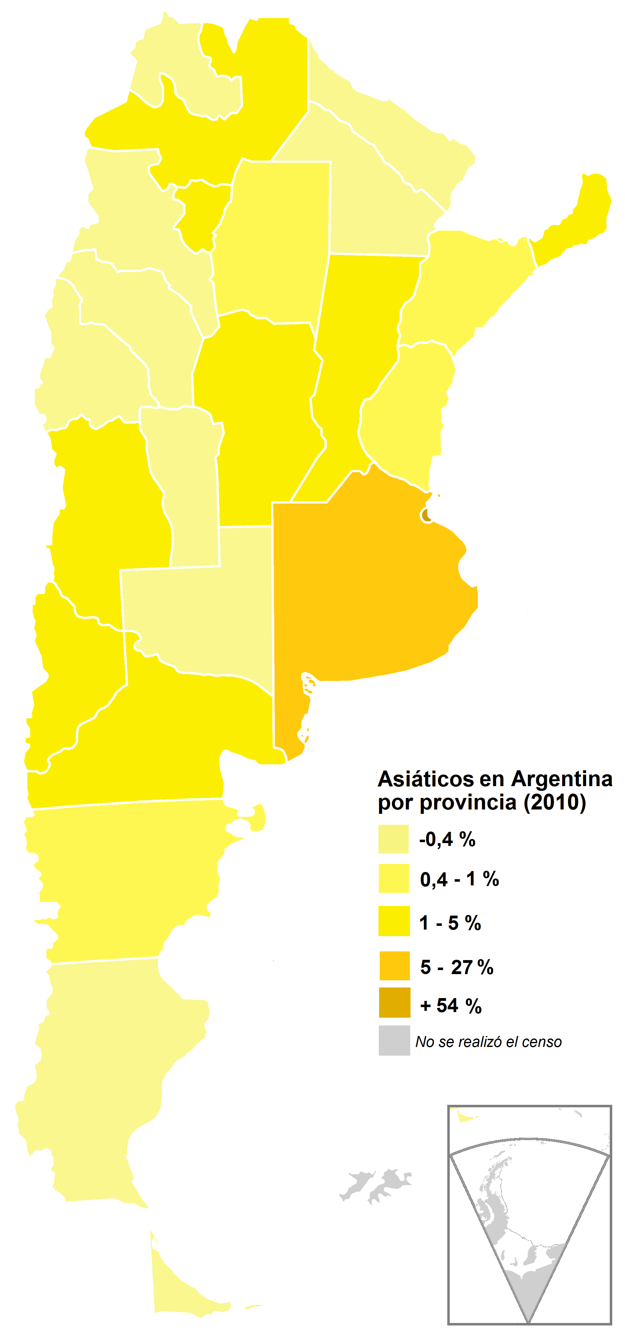 República Argentina por provincia. Población nacida en Asia, en porcentaje. Año 2010. Fuente: Censo 2010 - INDEC.